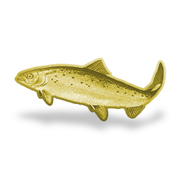 Salmo salar, golden